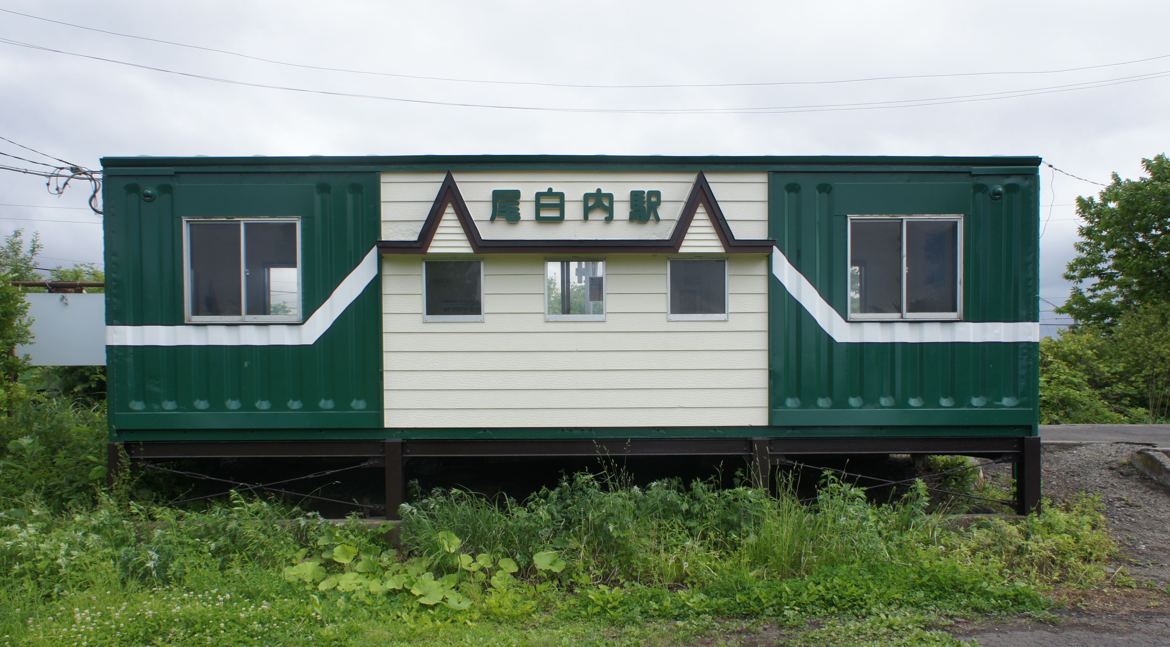 JR函館本線・尾白内駅の駅舎